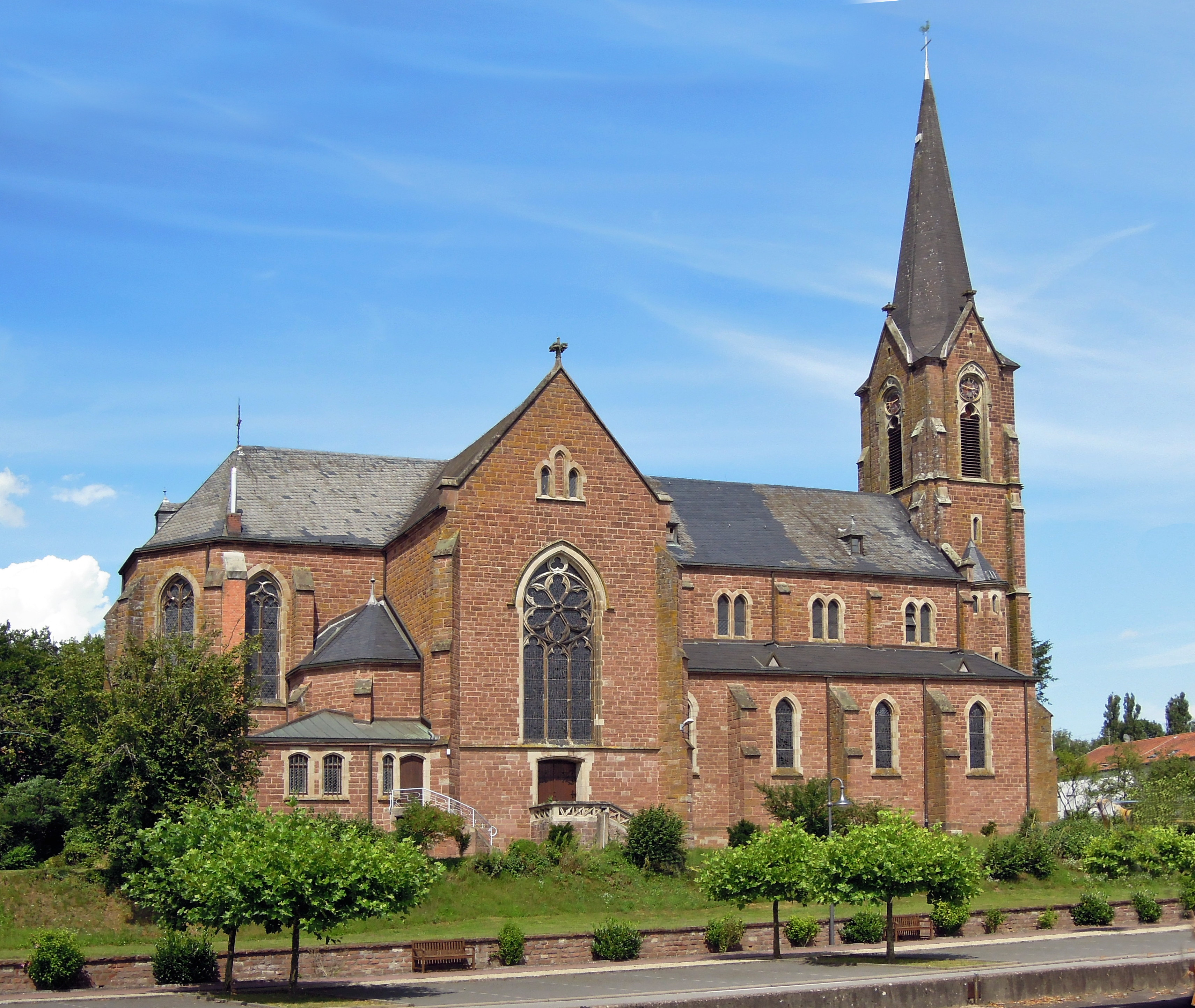 Reimsbacher Straße, kath. Pfarrkirche St. Andreas und Mariae Himmelfahrt, 1898–1901 von Wilhelm Hector (Einzeldenkmal)